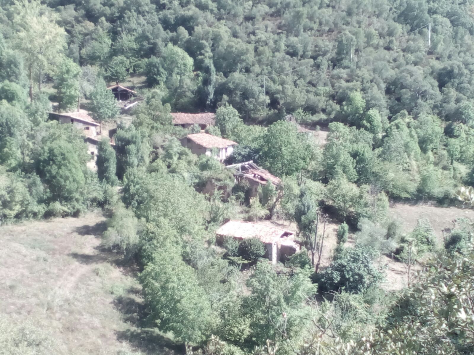 Vista del despoblado de Porcieda (Cantabria).